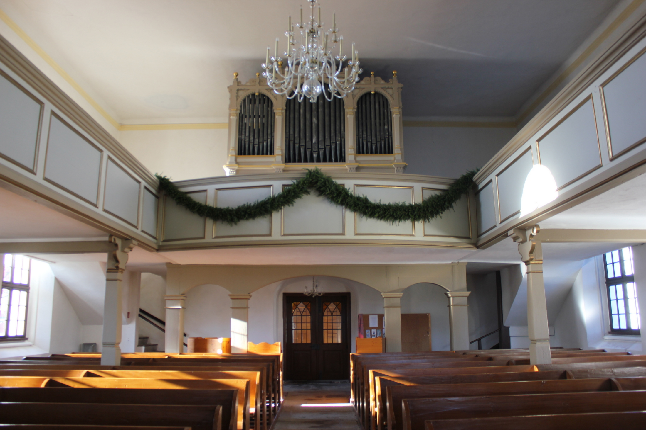 Hornjoserbsce: Ewangelska cyrkej w Malešecach z pišćelemi.